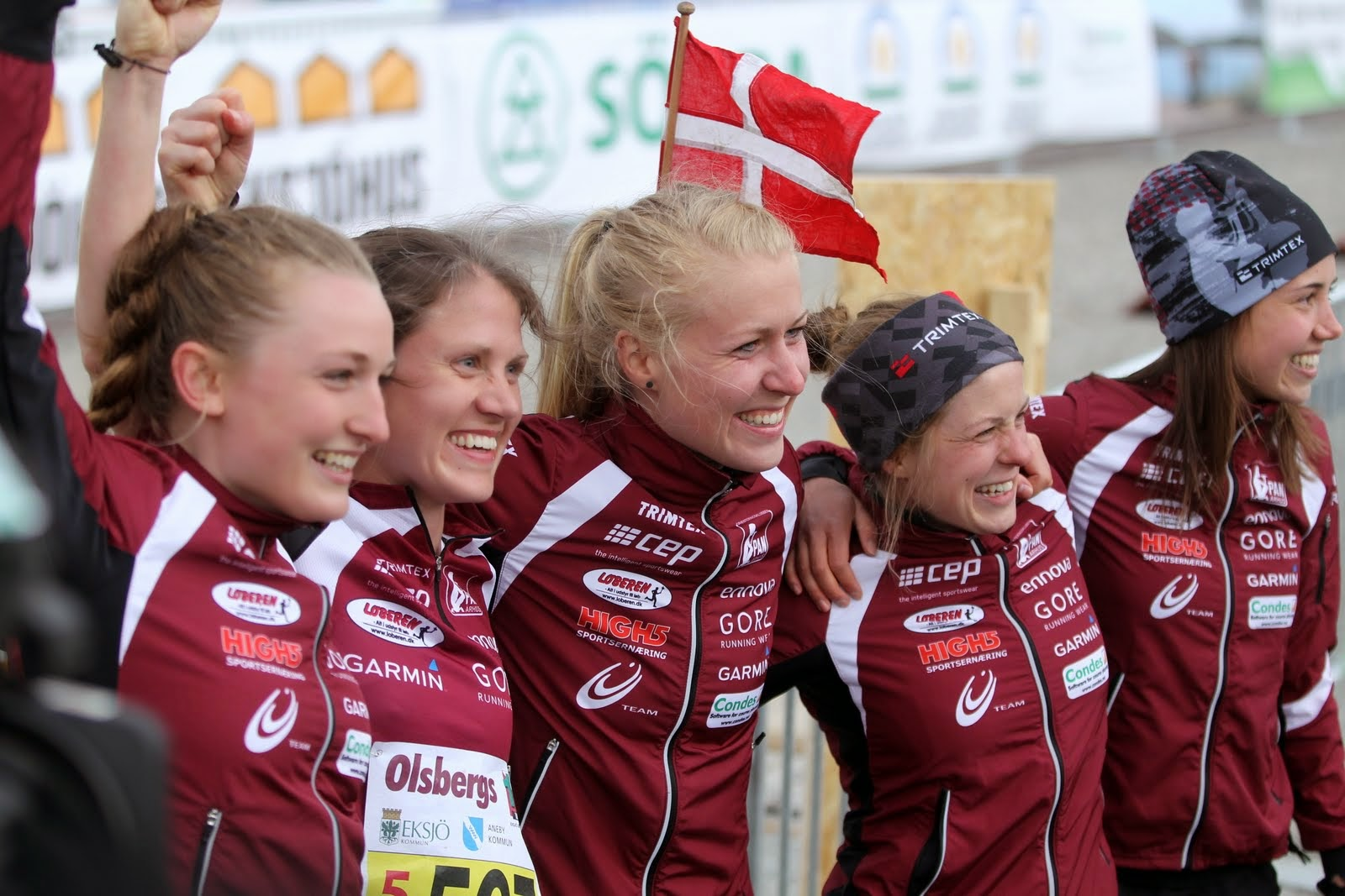 Winning team from OK Pan Århus at Venla 2014.